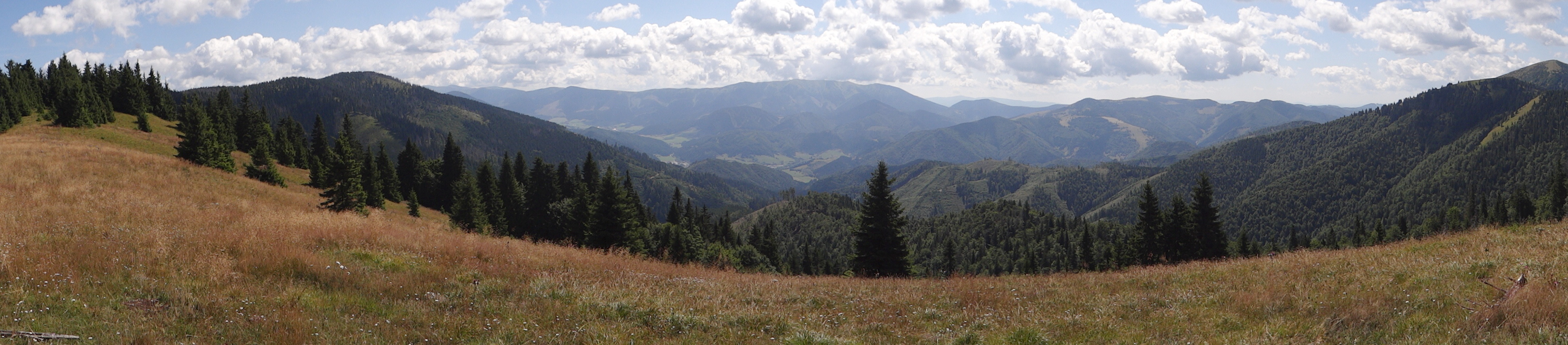 View from Skalná Alpa